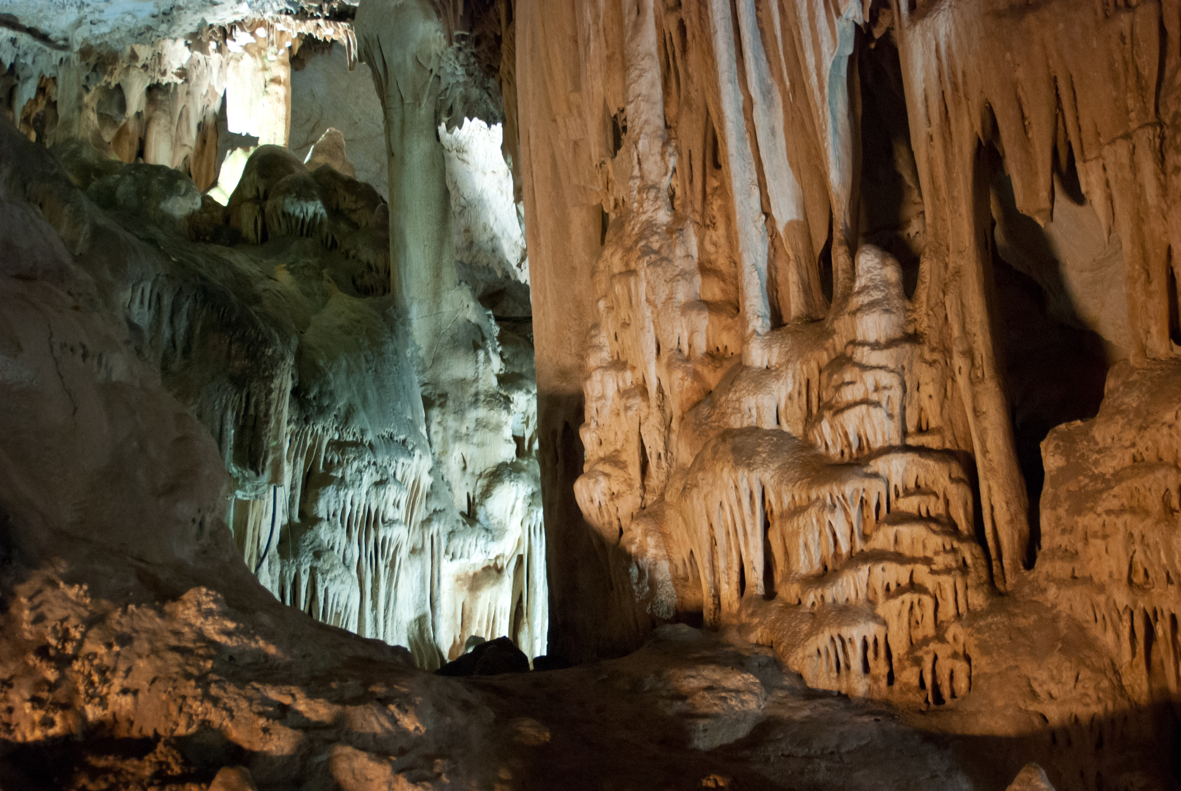 Detalle de la Cueva de Nerja